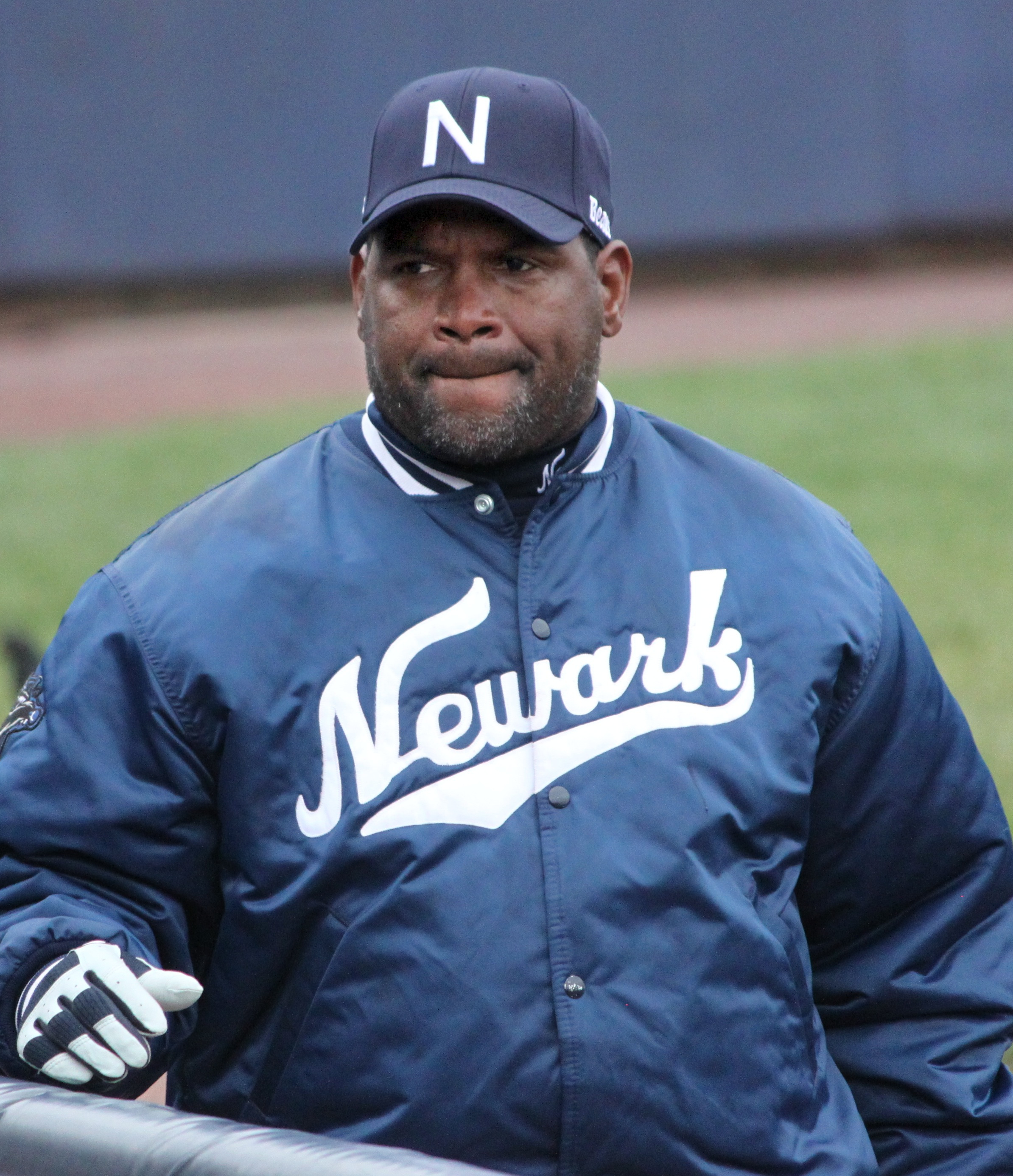 Newark Bears manager Tim Raines